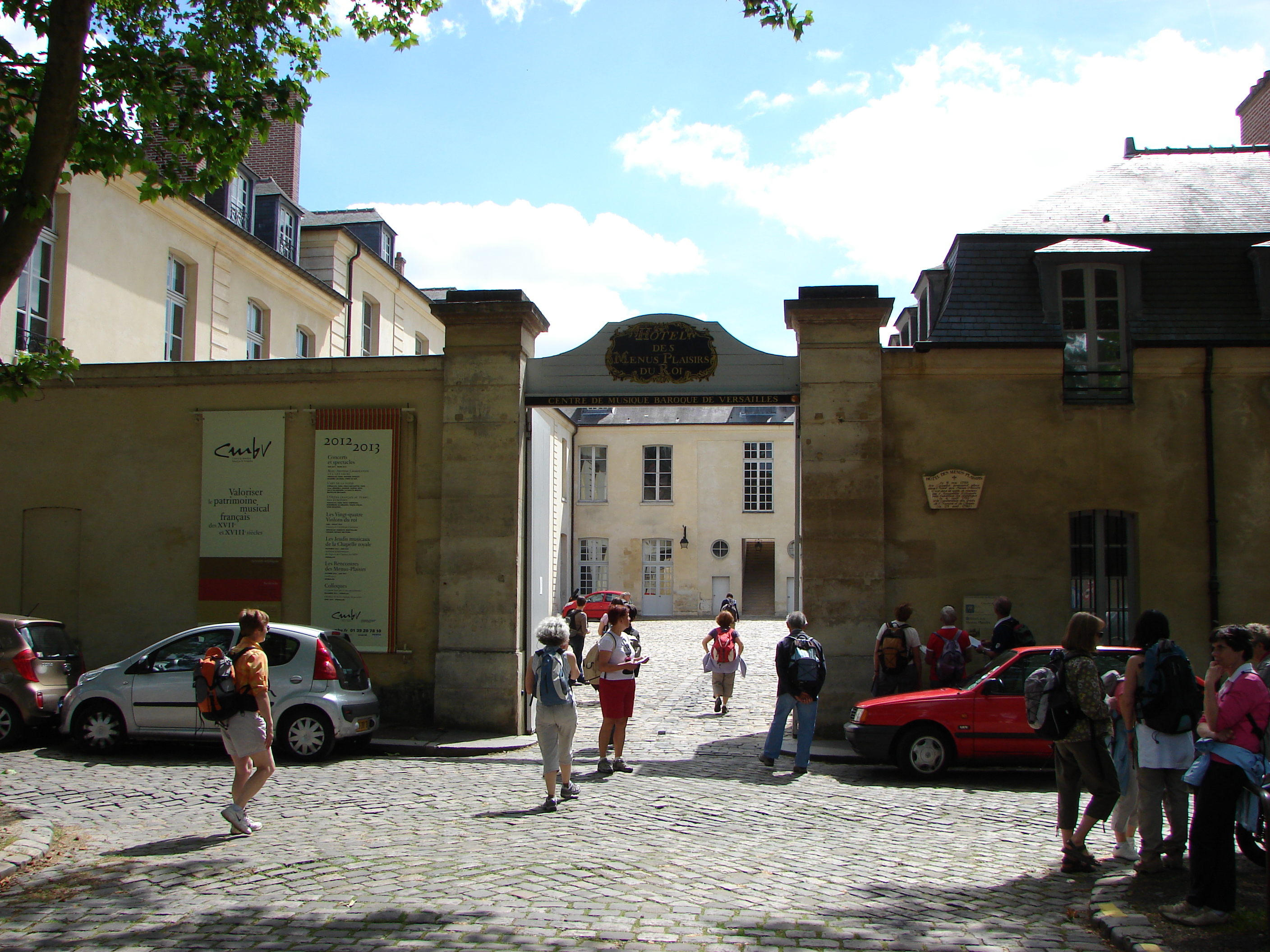 Entrée de l'Hôtel des Menus Plaisirs du 22 avenue de Paris Versailles